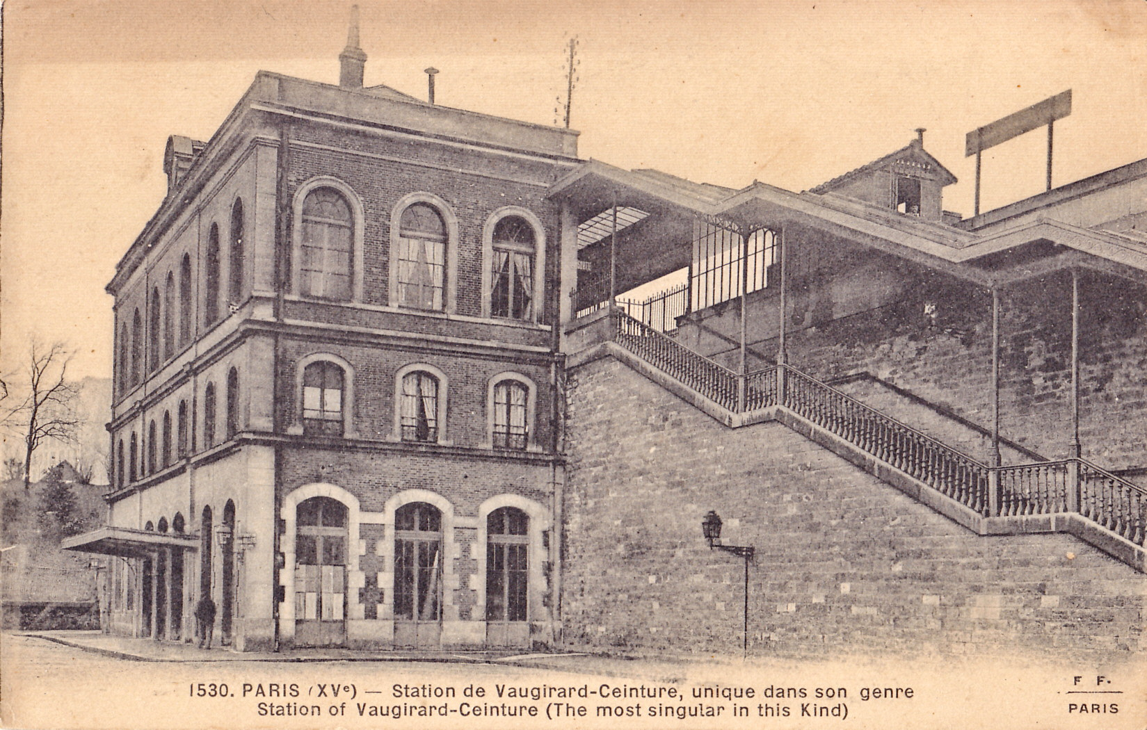 Carte postale ancienne éditée par FF, n°1530 : PARIS - Station de Vaugirard-Ceinture, unique en son genre